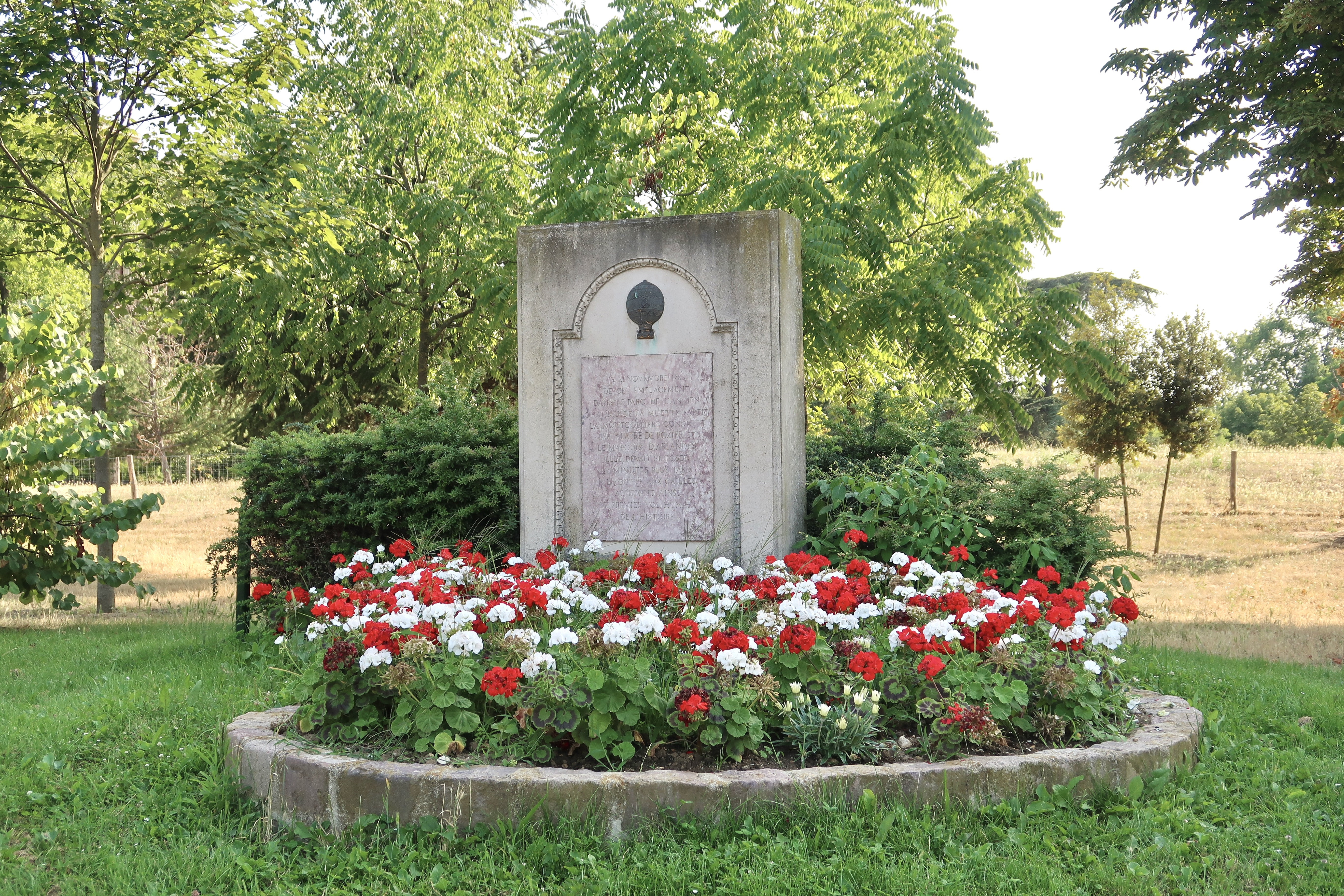 Monument en hommage au premier vol de montgolfière, place de Colombie (Paris, 16e).